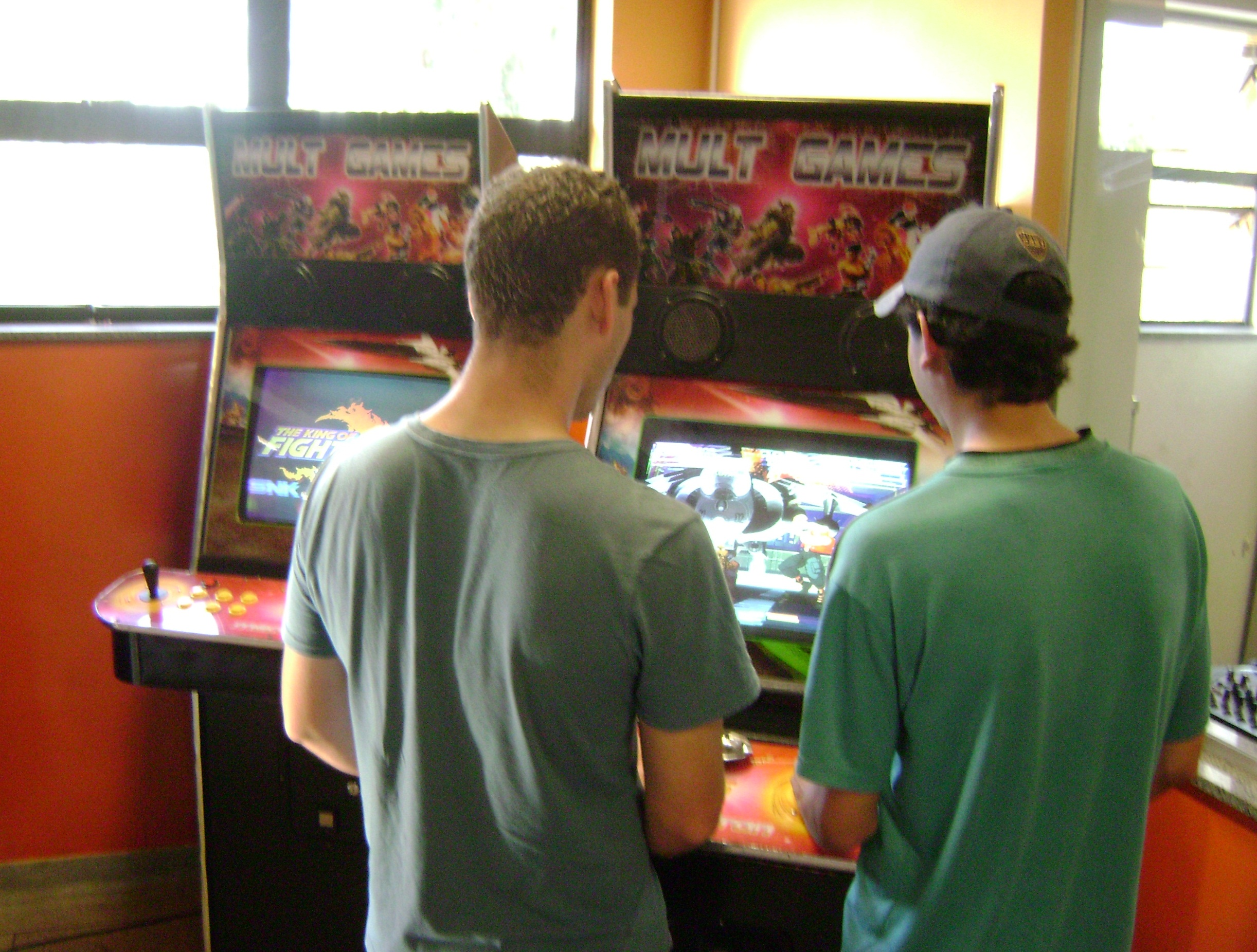 Pessoas a jogar fliperama no Diretório Central dos Estudantes do campus II do Centro Federal de Educação Tecnológica de Minas Gerais, em Belo Horizonte, Brasil.